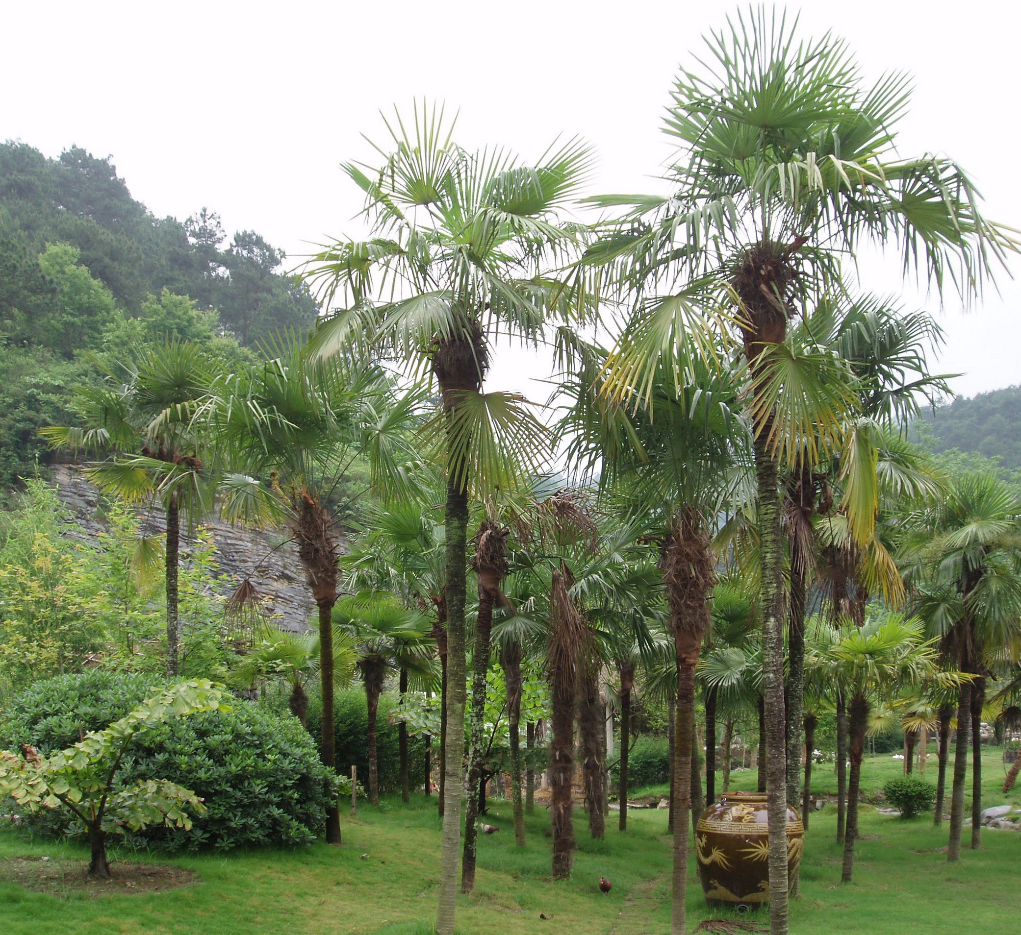 Palm trees